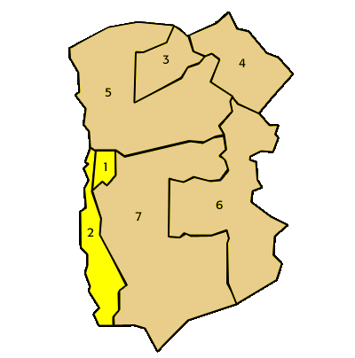 Comunas de la I Region de Tarapacá, Chile Comunas of the Tarapaca Region, Chile Prov. Iquique: 1. Alto Hospicio; 2. Iquique; Prov. El Tamarugal: 3. Camiña; 4. Colchane; 5. Huara; 6. Pica; 7. Pozo Almonte